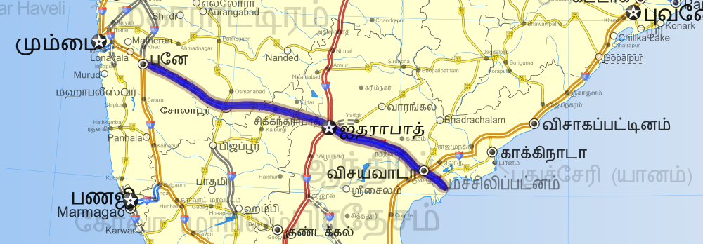 இந்திய தேசிய நெடுஞ்சாலை 9